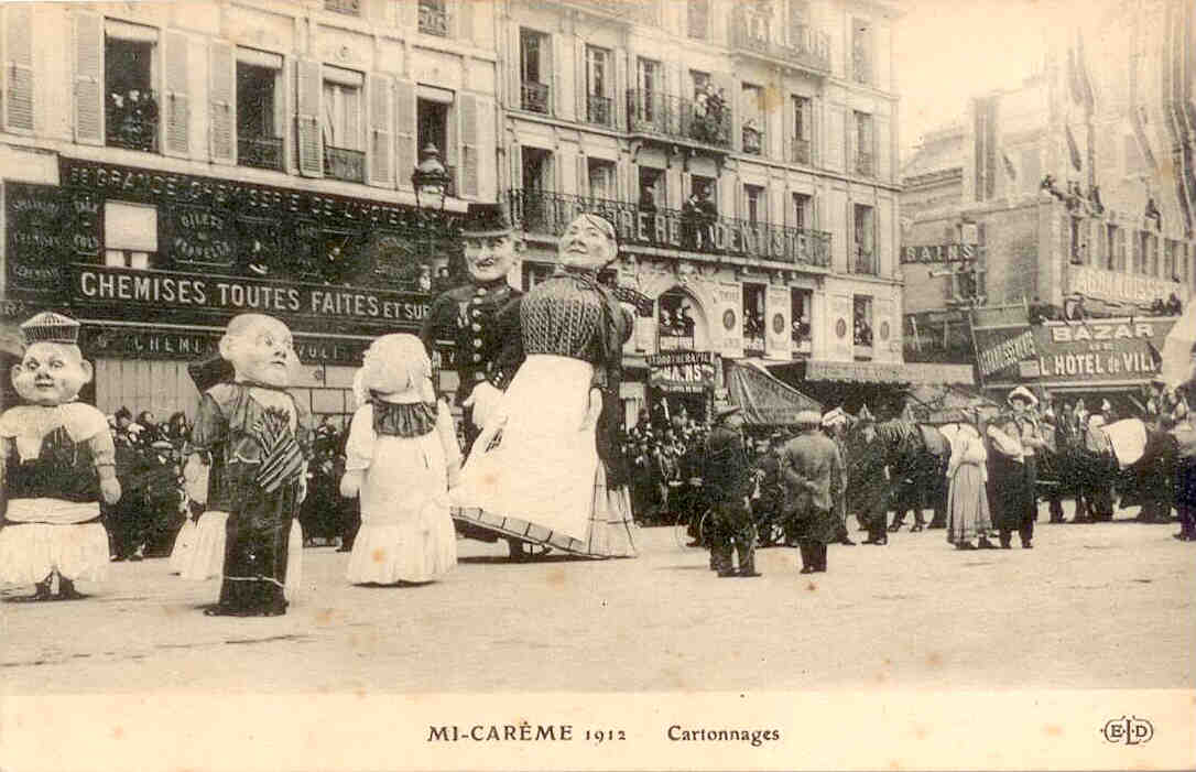 Figures géantes du carnaval de Nice défilant place de l'Hôtel de Ville à Paris à la Mi-Carême 1912.